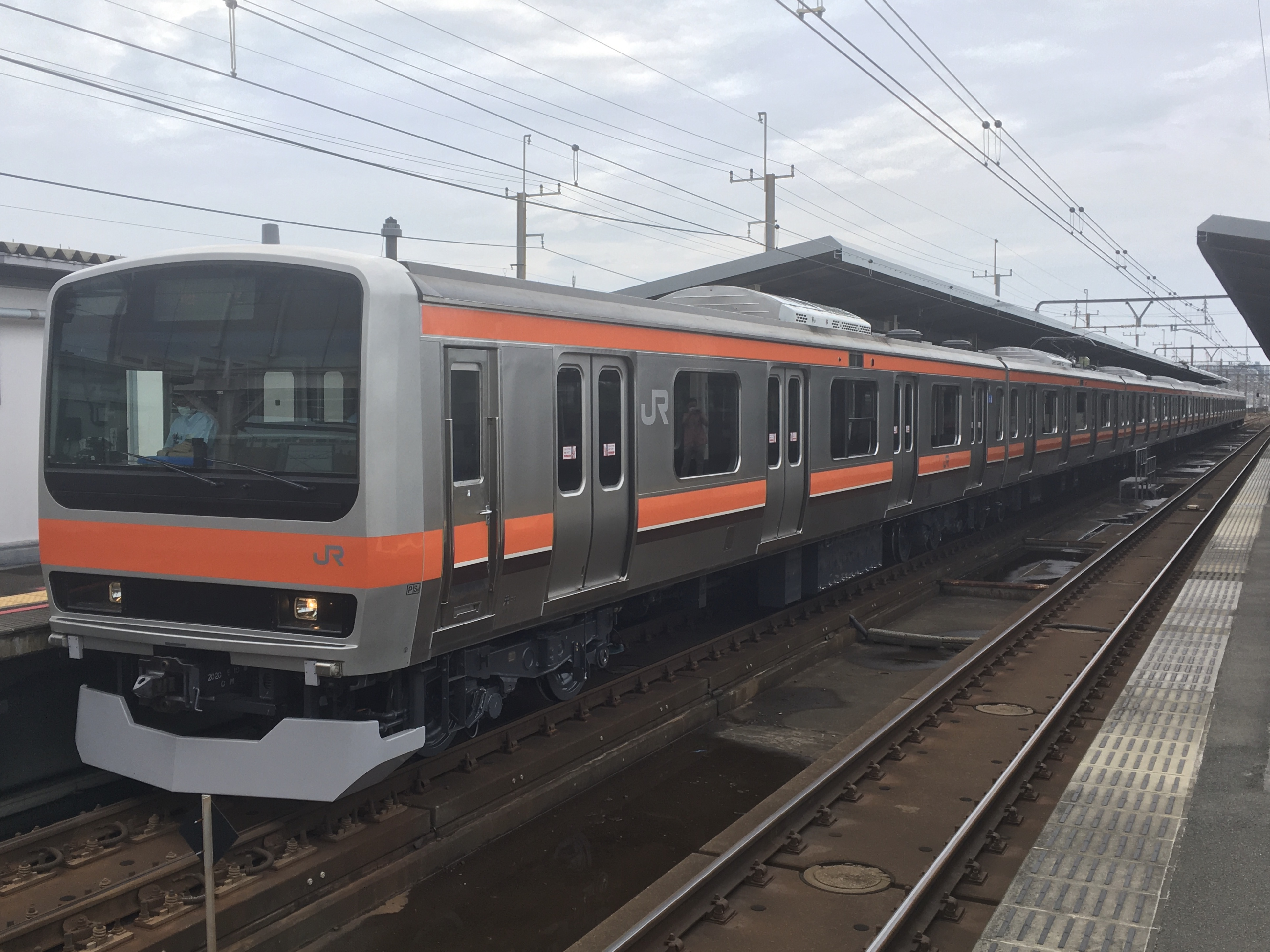 JR東日本E231系900番台ケヨMU1編成(武蔵野線仕様) 京葉線新習志野駅撮影